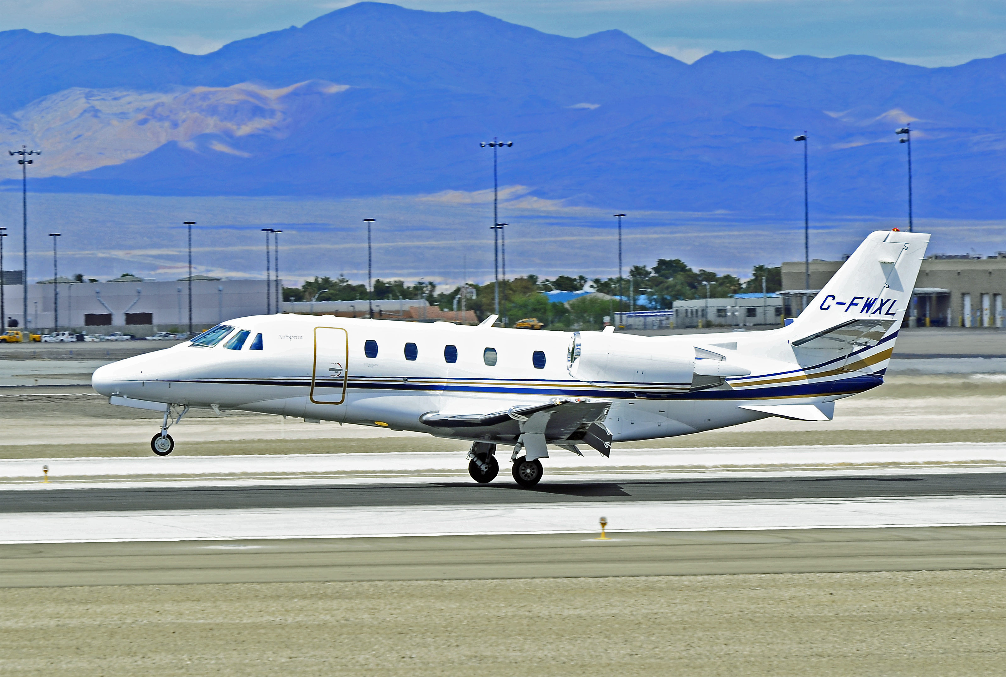 Las Vegas - McCarran International (LAS / KLAS) USA - Nevada, May 19, 2011 Photo: Tomás Del Coro